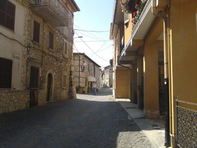 Corso Sant'Atanasio a Scanzano dei Marsi